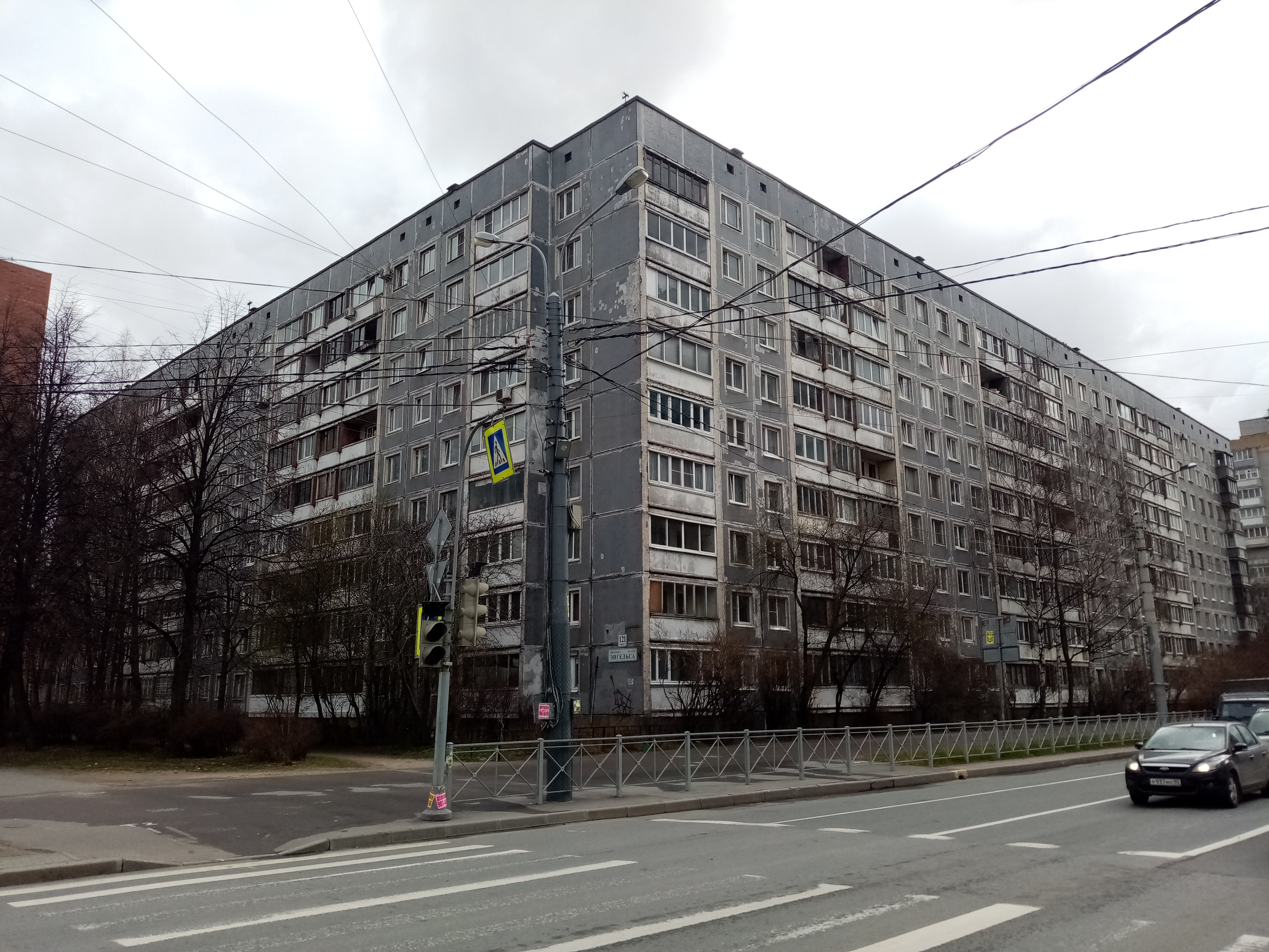 Дом 121к1 на пересечении проспектов Энгельса и Луначарского